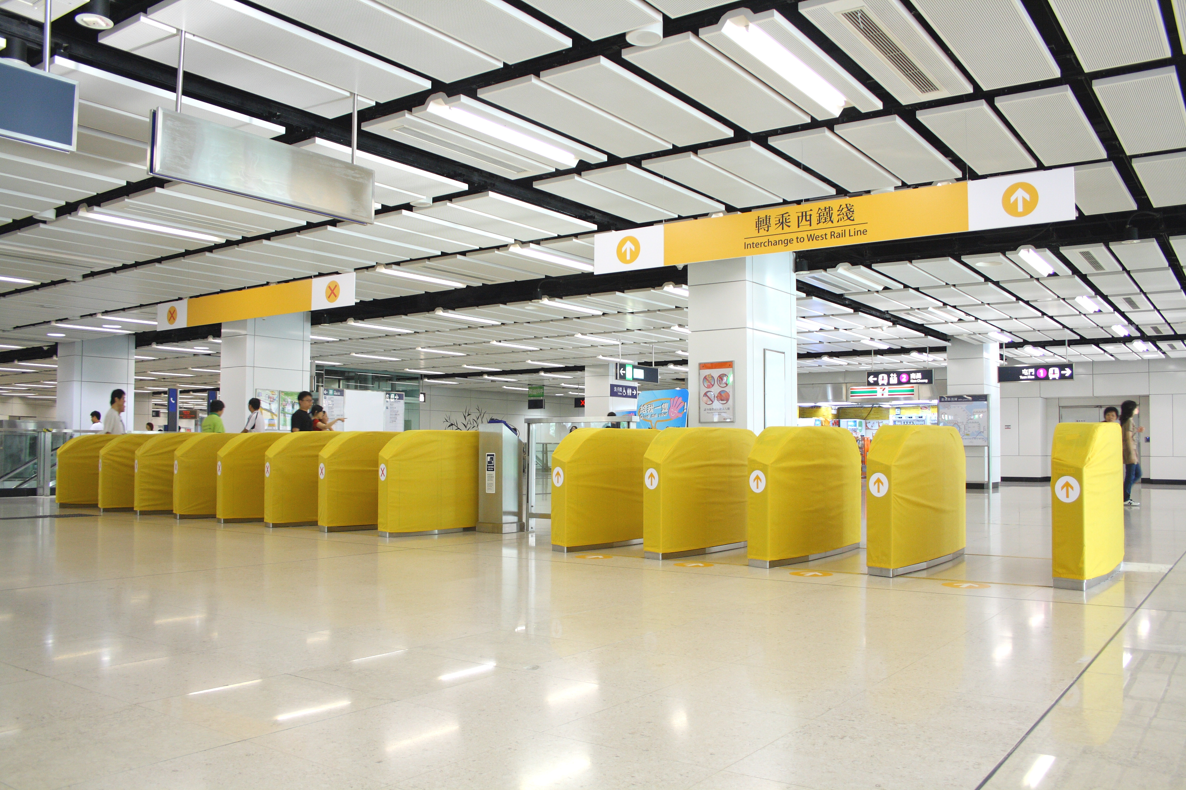 中文（香港）: 港鐵收費區合併初期的美孚站